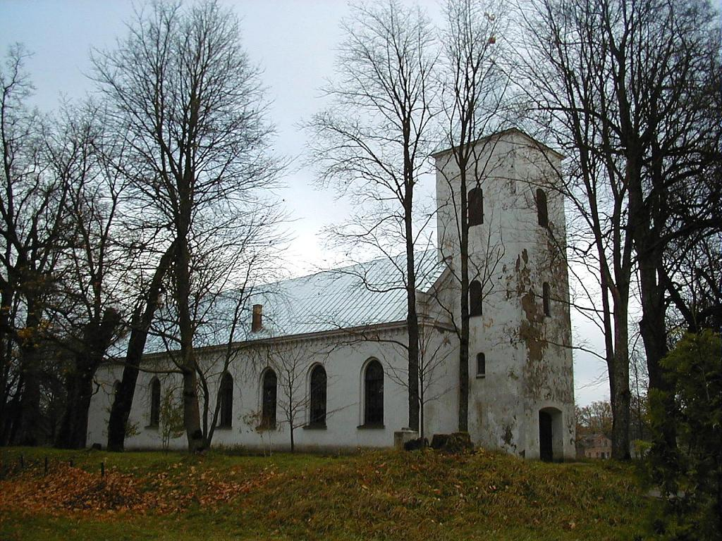 Auces luterāņu baznīca 2001-10-27